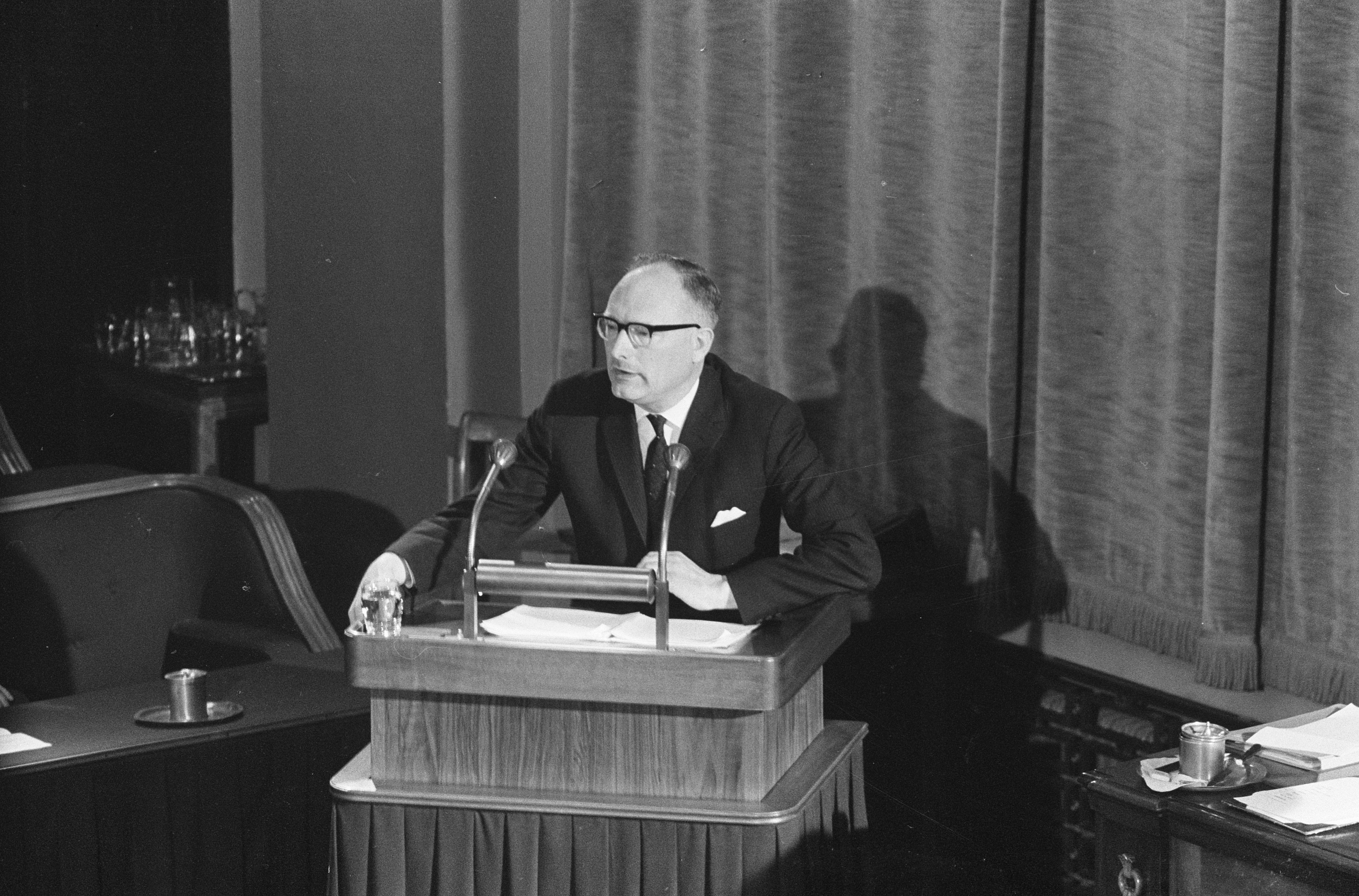 Collectie / Archief : Fotocollectie Anefo Reportage / Serie : [ onbekend ] Beschrijving : Mammoetwet in de Eerste Kamer, Van Hulst (CHU) aan het woord Datum : 5 februari 1963 Locatie : Den Haag, Zuid-Holland Trefwoorden : afgevaardigden, parlementaire debatten Persoonsnaam : Hulst, J.W. van Instellingsnaam : CHU Fotograaf : Pot, Harry / Anefo Auteursrechthebbende : Nationaal Archief Materiaalsoort : Negatief (zwart/wit) Nummer archiefinventaris : bekijk toegang 2.24.01.05 Bestanddeelnummer : 914-7884